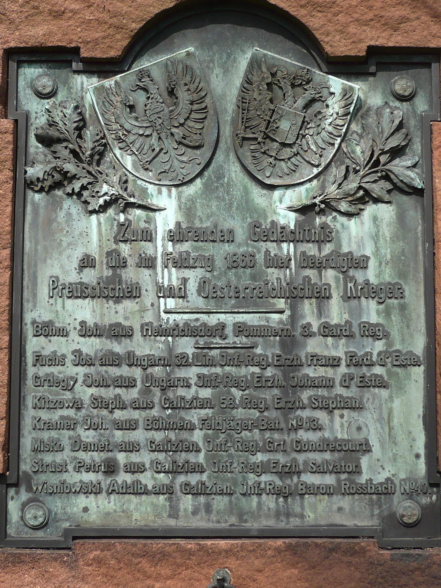 Nowa Ruda, ul. Cmentarna - cmentarz komunalny (tablica na obelisku ofiar wojny z 1866 r)